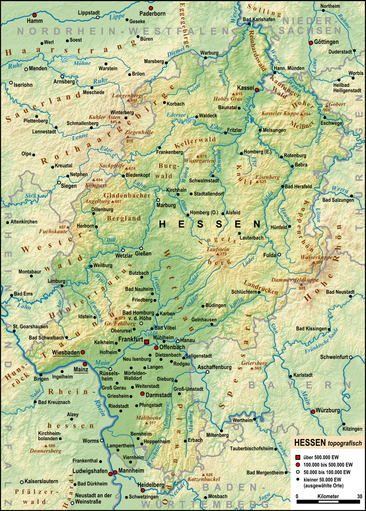 Topographische Karte von Hessen